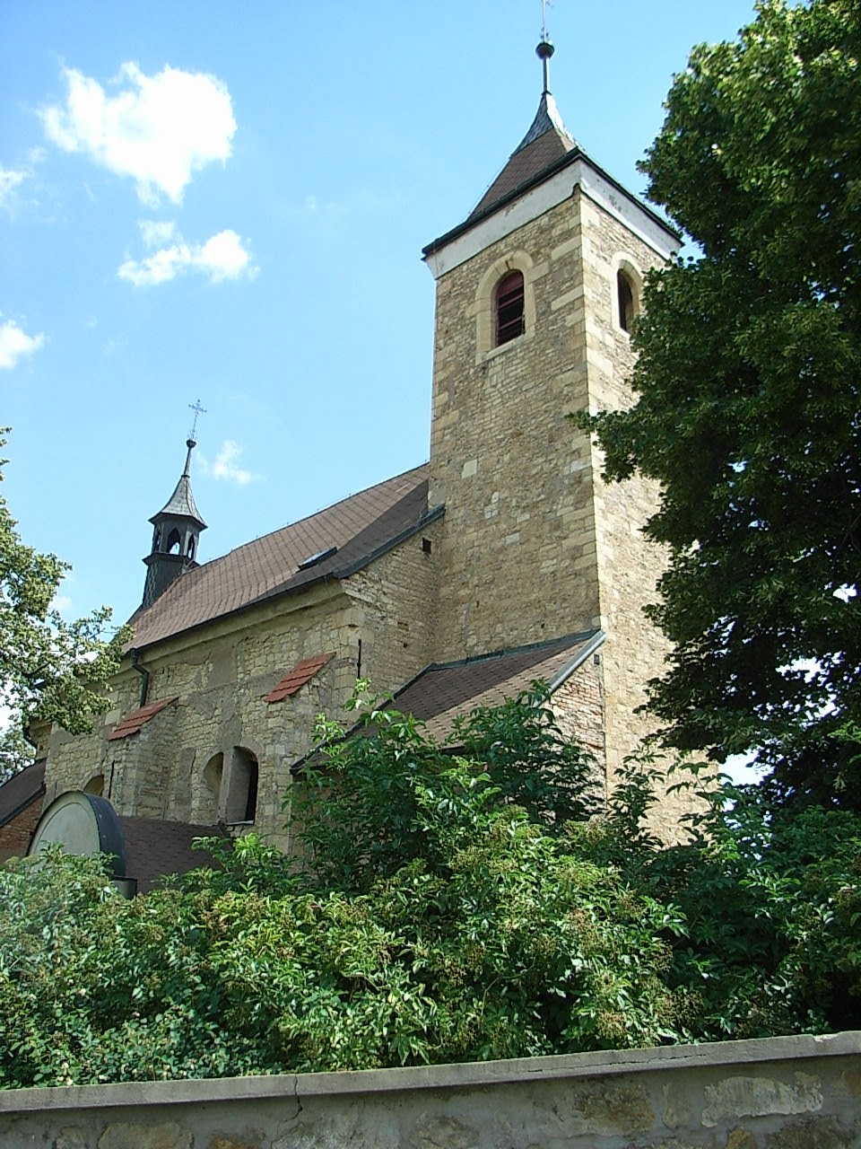 Kostel všech svatých v Rané, okres Louny.